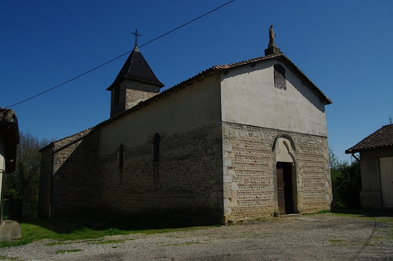 La chapelle du Chatelard, ain